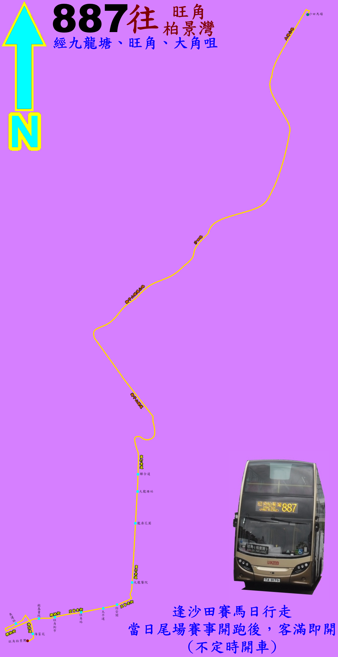 中文（香港）: 馬場巴士887線的走線圖